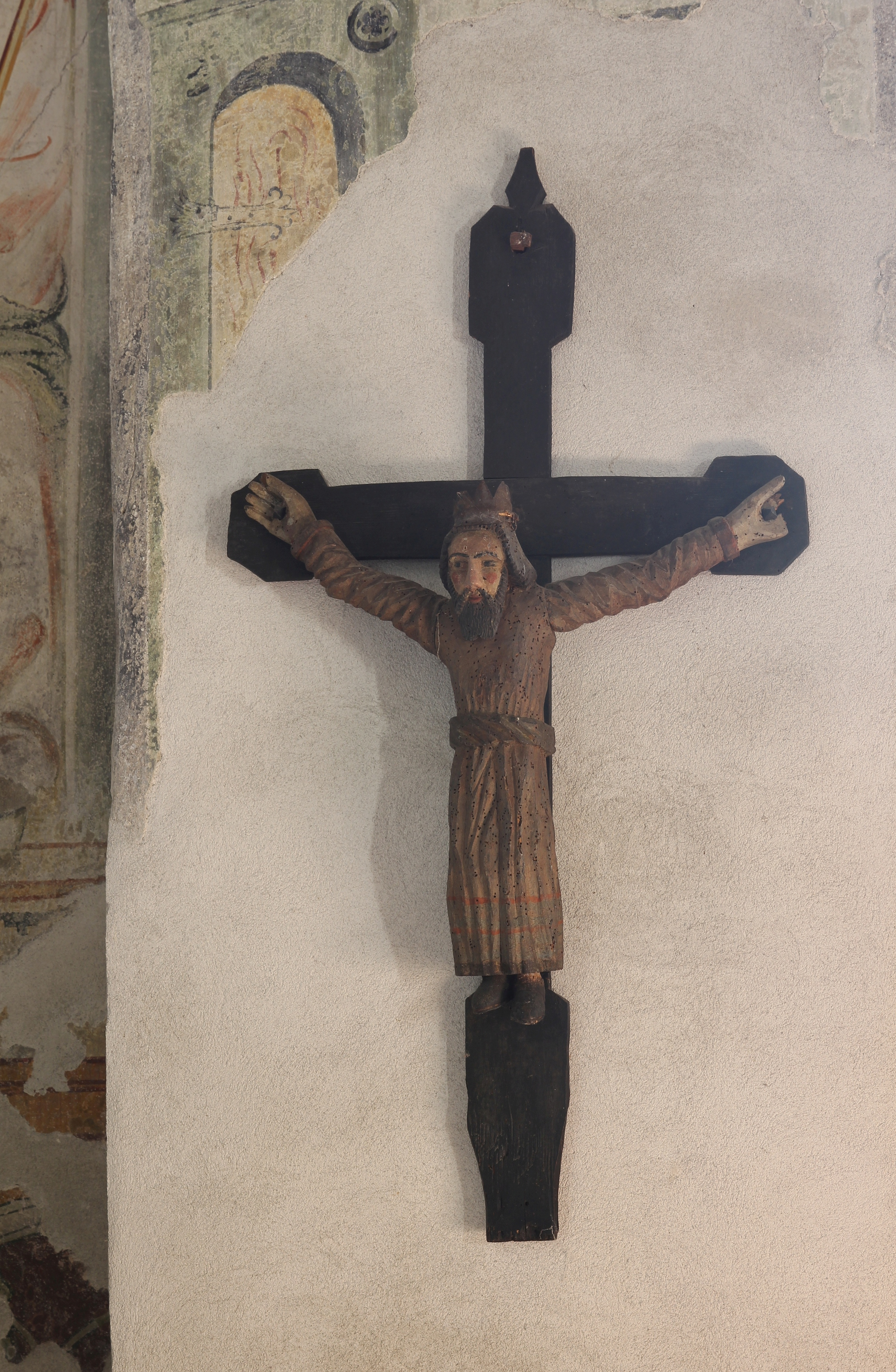 Kruzifix mit der Hl. Kummernus in St. Georg, Schenna